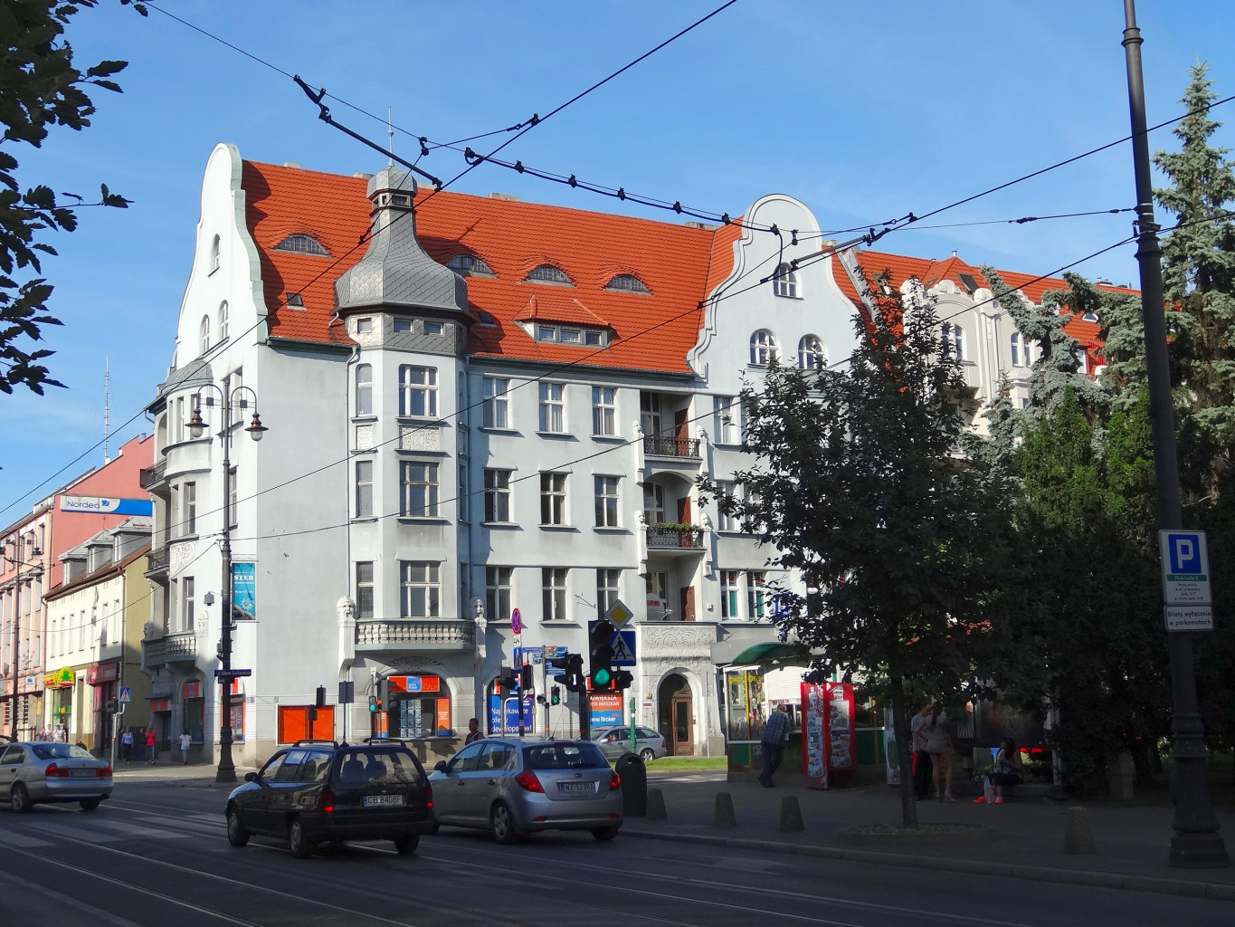 Kamienica al. Mickiewicza 1 róg ul. Gdańskiej w Bydgoszczy